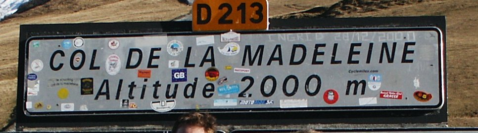 Panneau du col de la Madeleine